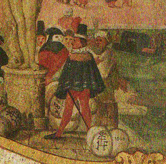 Detail der venezianischen Szene auf Walschulterblatt des Heimatmuseums Polling